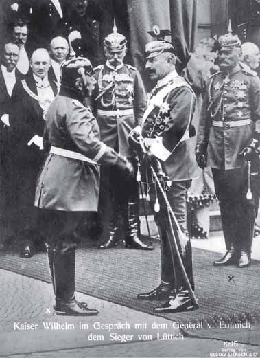 Die Generale Hans Georg von Plessen (Bildmitte) und Moriz von Lyncker (rechts) beobachten Kaiser Wilhelm II. und Otto von Emmich, den Kommandeur des X. Armee-Korps. Dritter von links ist der Stadtdirektor von Hannover, Heinrich Tramm. Anläßlich der Einweihung des Neuen Rathauses in Hannover wartet er geduldig, während der Kaiser zuerst den General Emmich begrüßt. Das schwarze Kreuz unterhalb von Moritz von Lynker deutet auf die Herkunft der Ansichtskarte aus dem Nachlaß des Hauses von Lynker (siehe bitte auch die Diskussion. Der Hinweis auf Emmich als Sieger von Lüttich in der Bildunterschrift ist ein Zusatz aus den Jahren des Ersten Weltkriegs (1914-1918). Datum: 20. Juni 1913; Quelle: Michael Krische: Das Neue Rathaus Hannover. Entstehung, Architektur, Bedeutung, hrsg. v. der Stadt Hannover, zu Klampen Verlag, Springe 2006, ISBN 3-934920-99-3, S. 78 (Vergleich mit dem dortigen Foto; im Besitz des Stadtarchivs Hannover) Urheber: bisher noch unidentifizierter Fotograf, Kürzel auf der Bildseite "Kr. 13 [15, 16?]", Ansichtskarte aus dem Verlag "Gustav Liersch & Co." Quelle: Bundesarchiv, Abt. Militärarchiv, Freiburg Hinweis: Urheberschutz abgelaufen